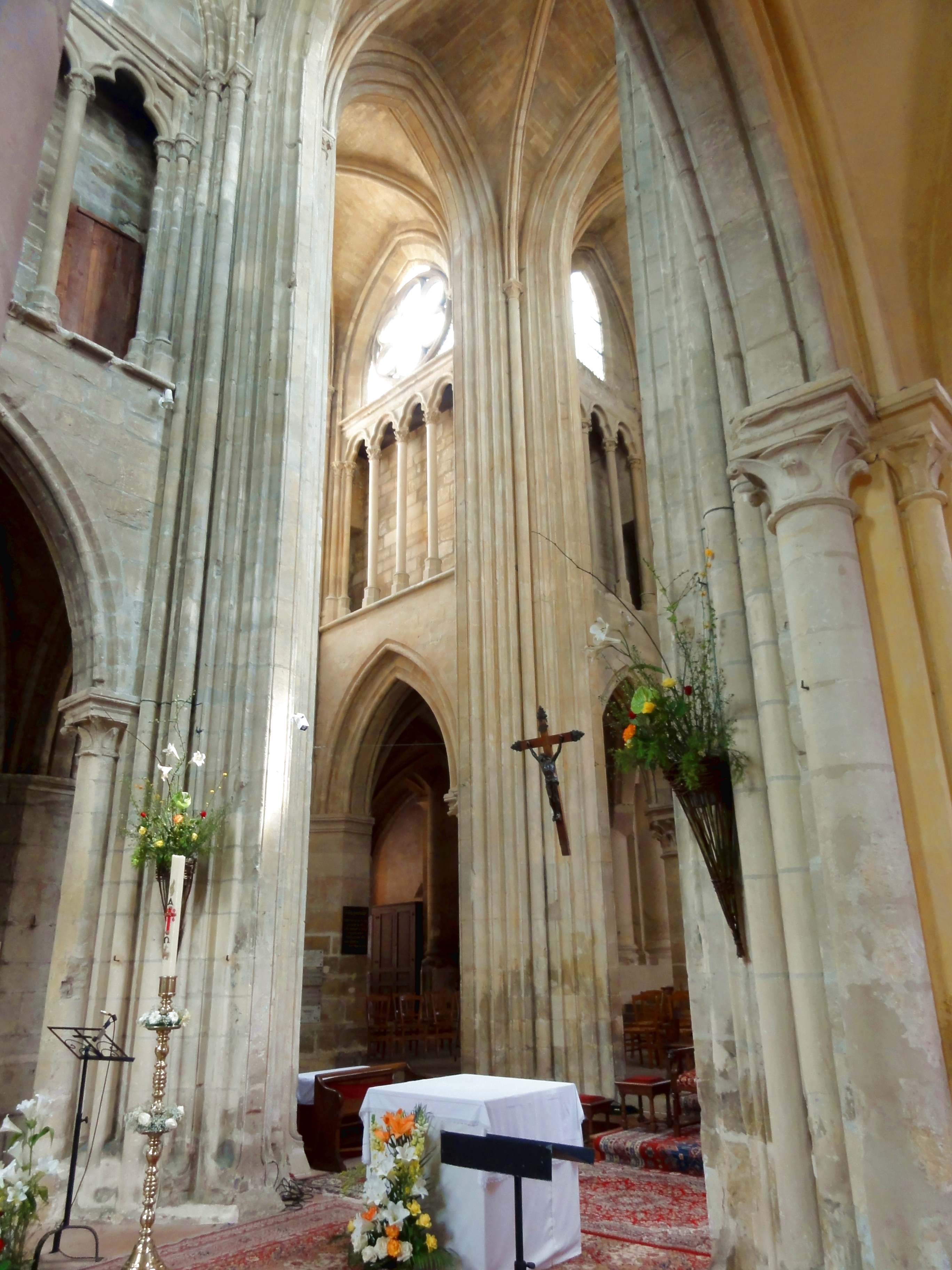 Intérieur de l'église - voir titre.